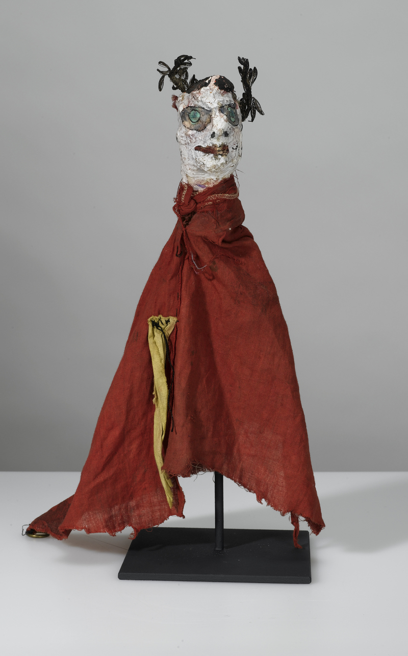 Paul Klee Ohne Titel (Gekrönter Dichter), von 1919, Höhe 35 cm, Zentrum Paul Klee, Bern, Schenkung Livia Klee